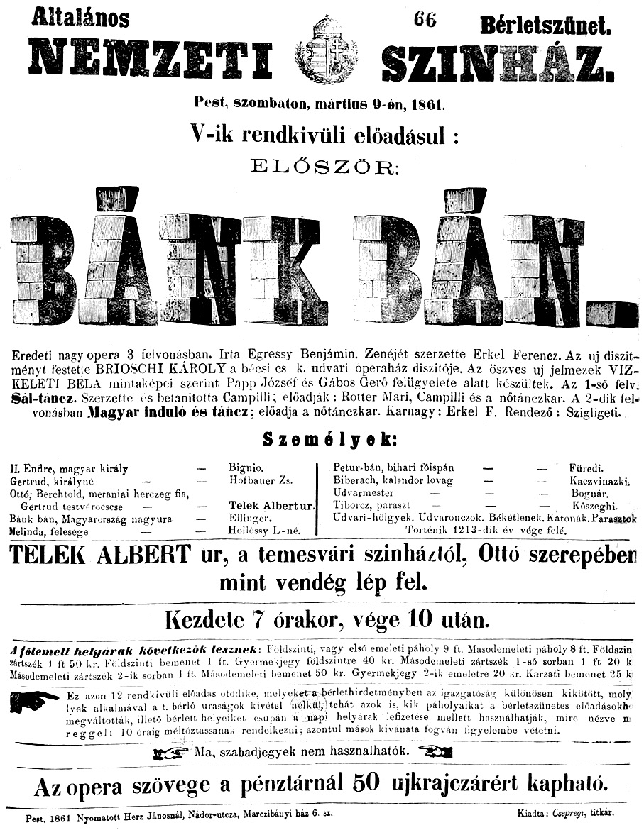 A Bánk bán ősbemutatójának plakátja.